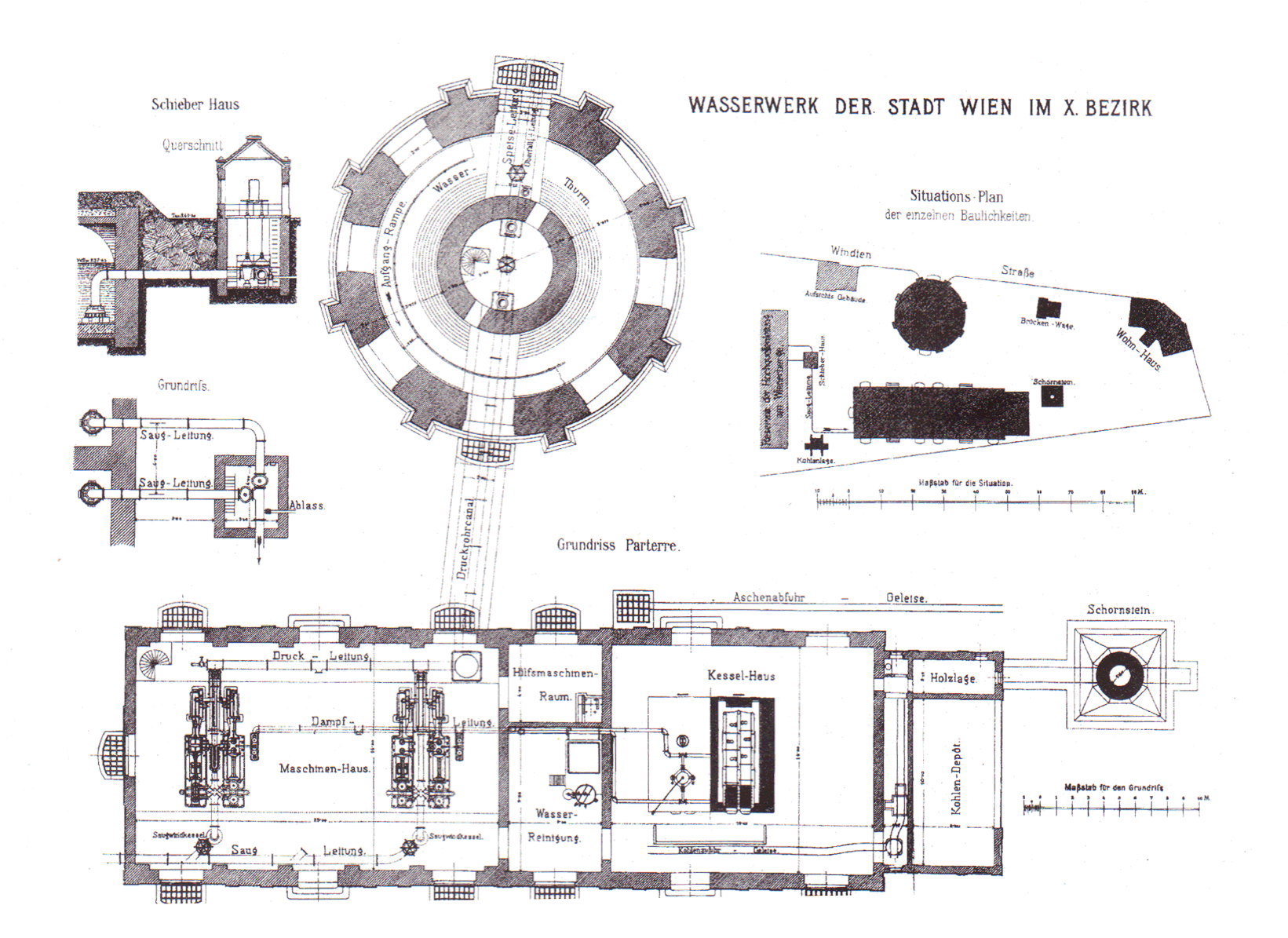 Plan der Anlage des Wasserturms in Favoriten mit Maschinenhaus